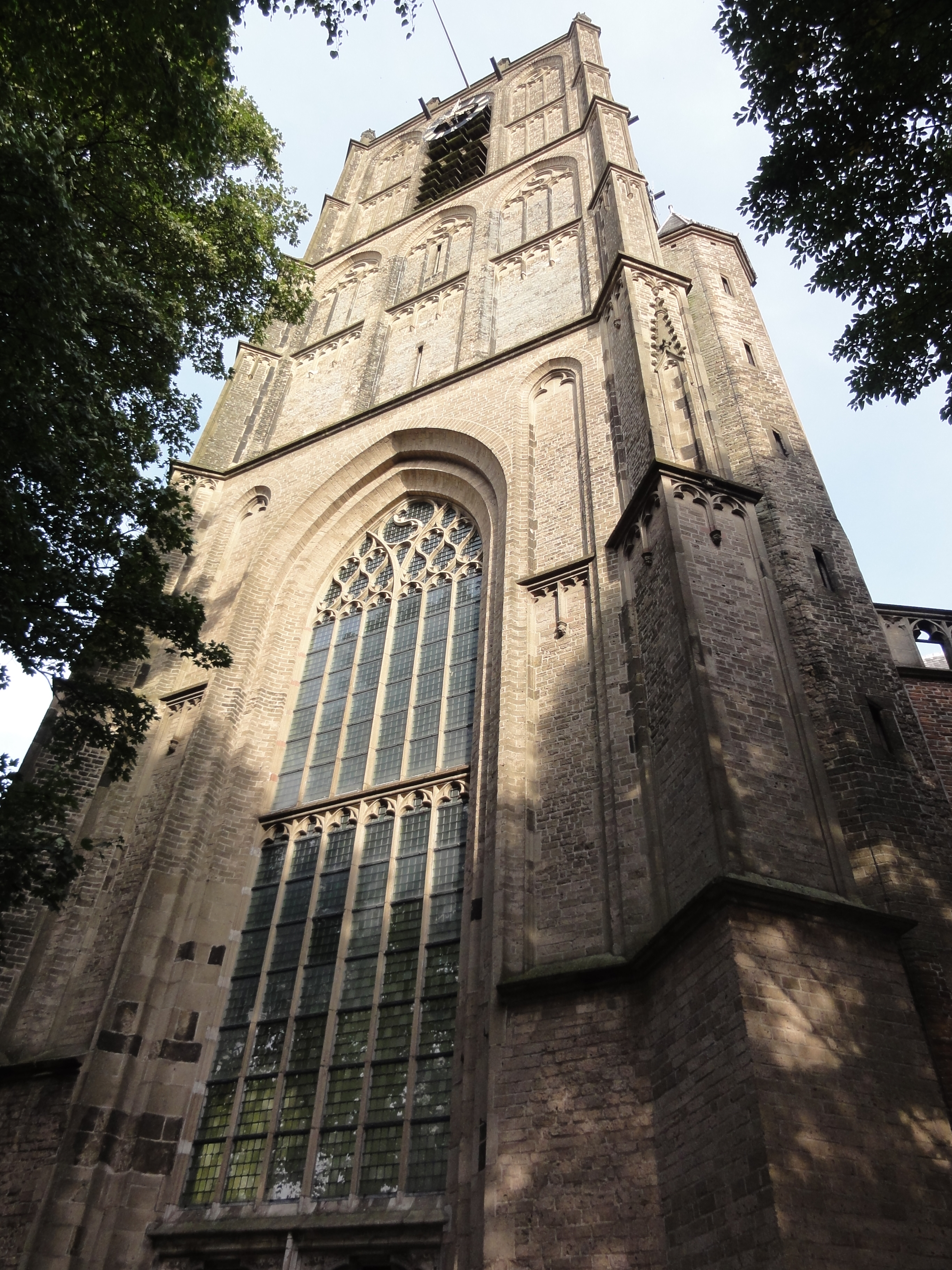 Toren van de Grote of St.Maartenskerk in Tiel 74″ N, 5° 26′ 00.89″ E